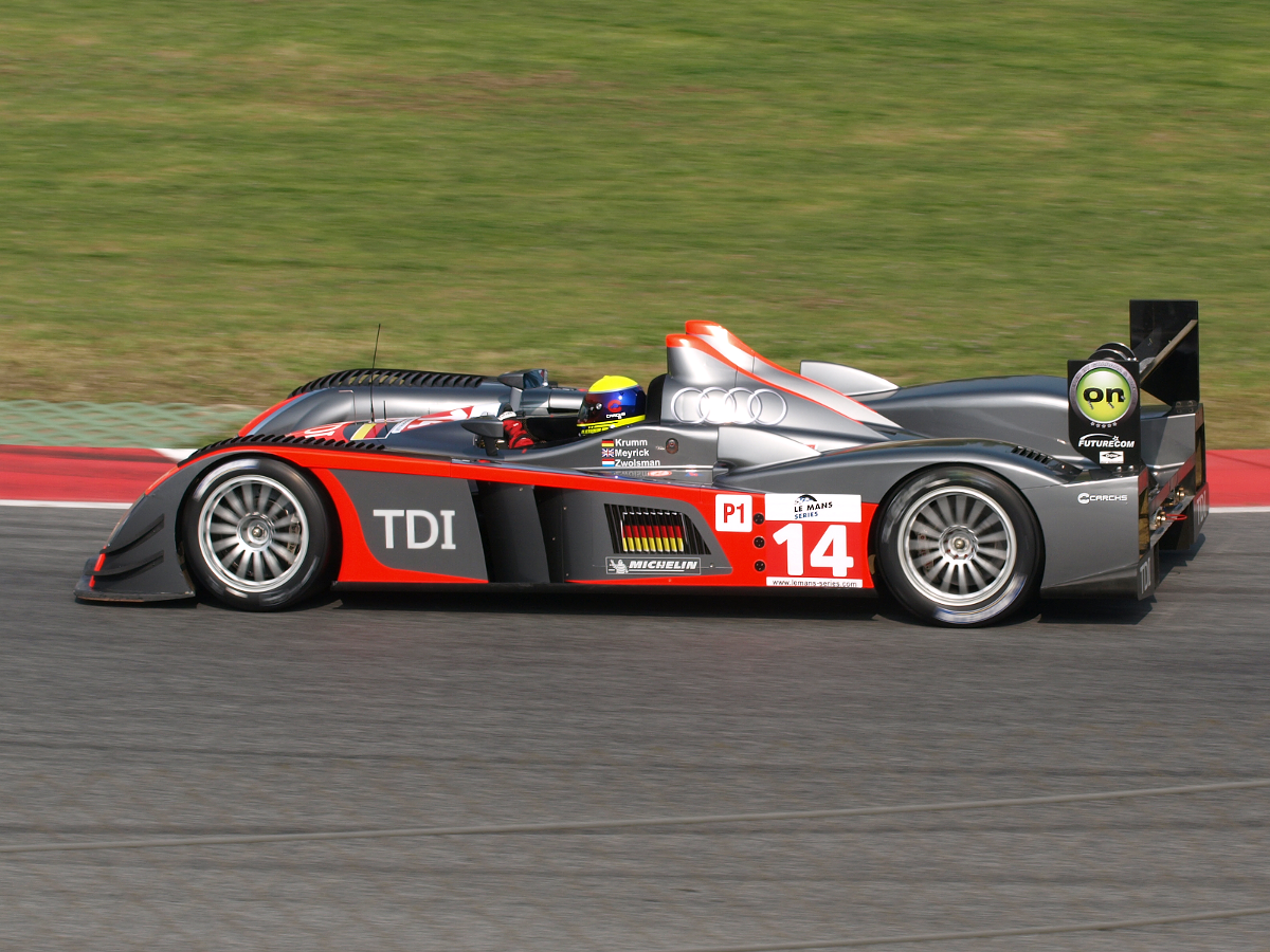 Uno de los Audi favoritos a ganar la carrera.